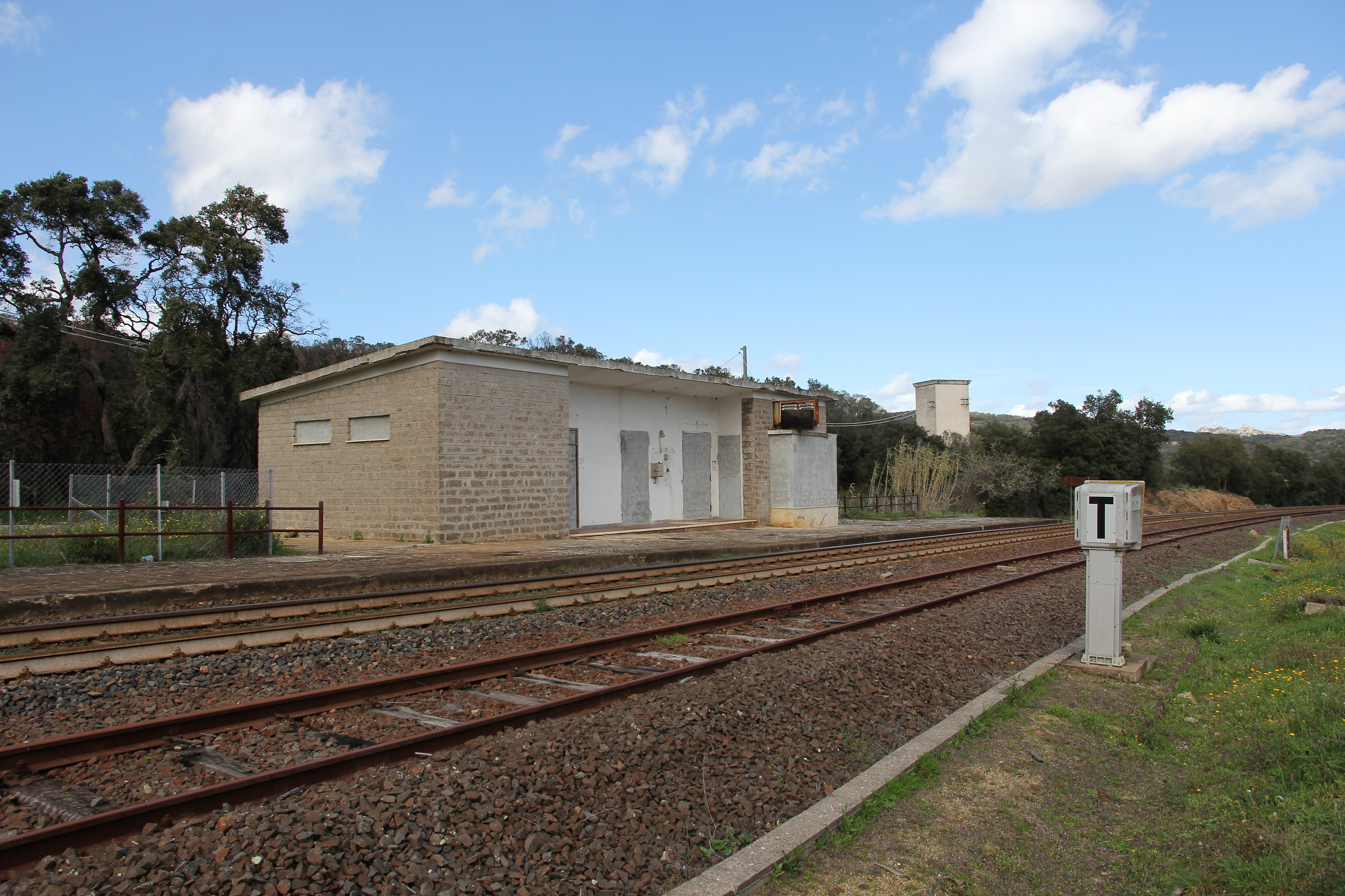 Monti, stazione ferroviaria di Chirialza